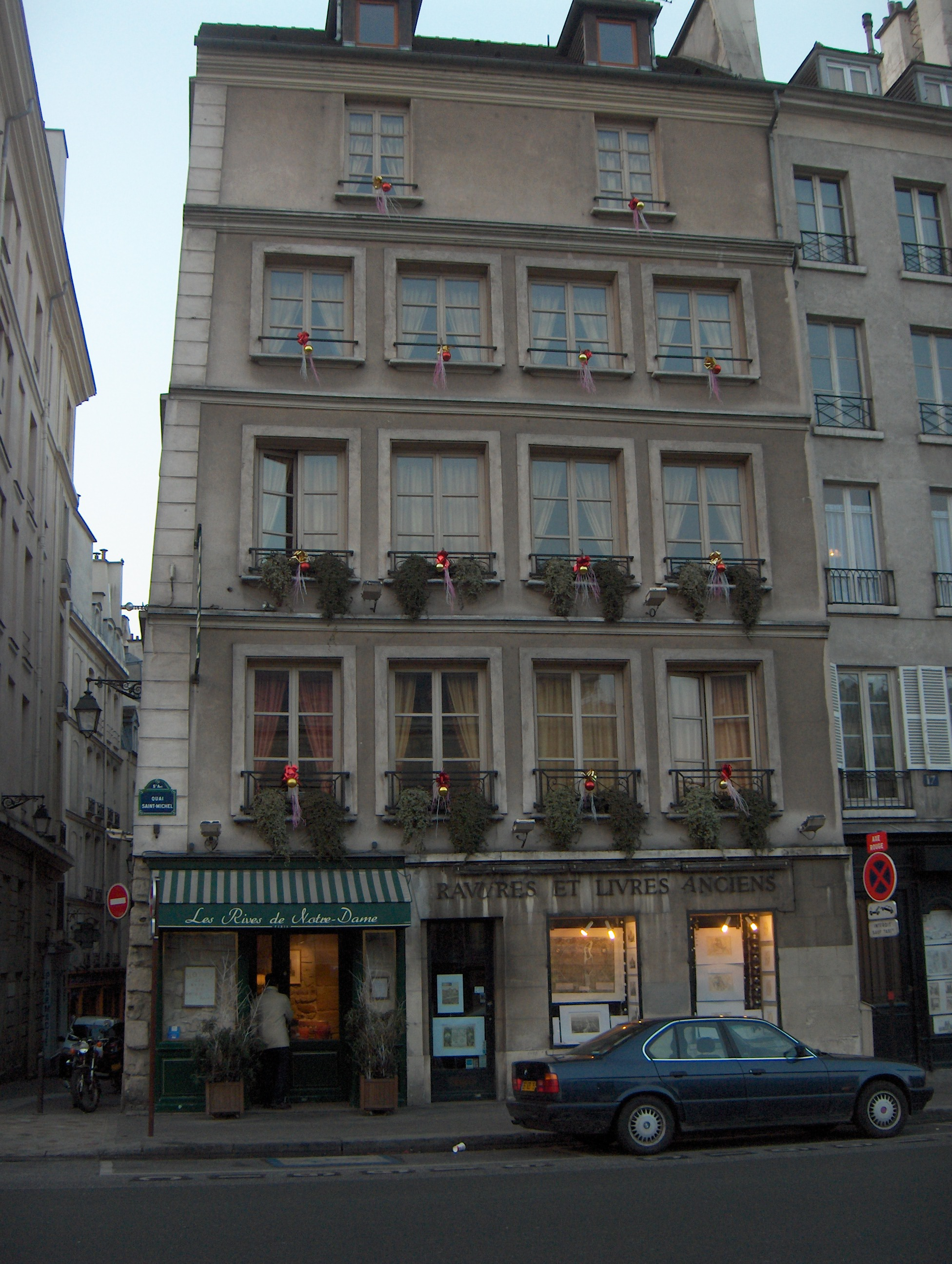 Hotel Les Rives De Notre Dame, 15 Quai Saint-Michel, 75005 Paris, France.